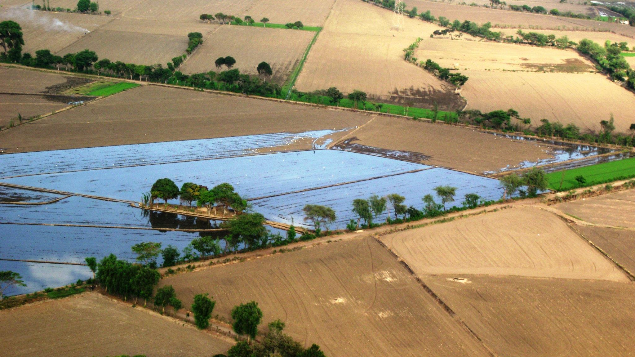 Desde El Cerro, Una Vista De Ensueño